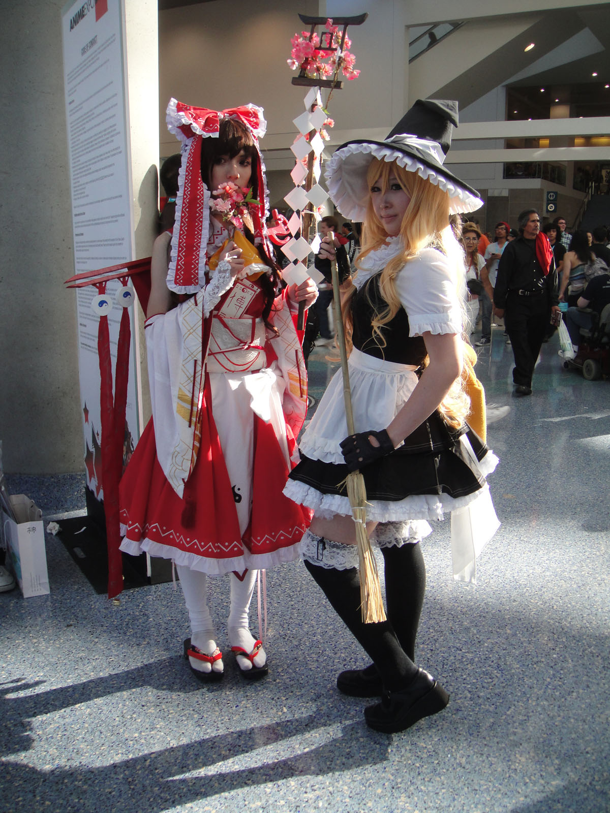 Anime Expo 2012